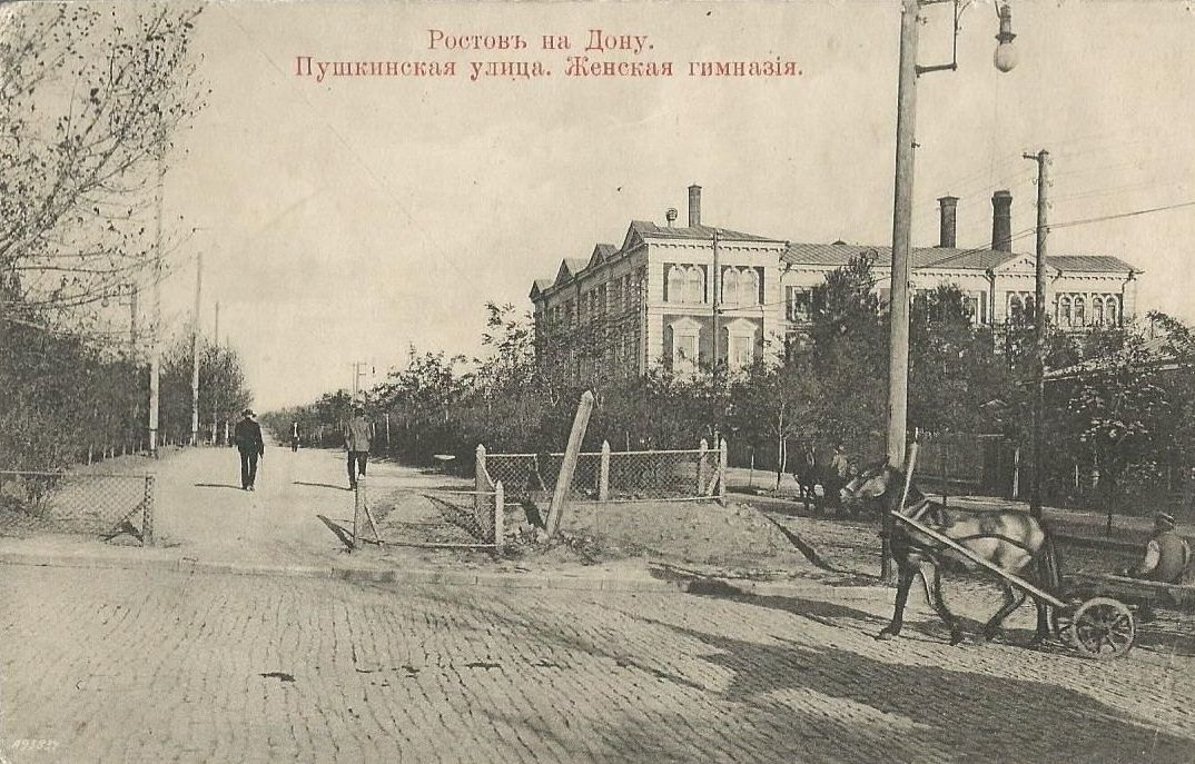 Ростов-на-Дону. Пушкинский бульвар. Женская гимназия